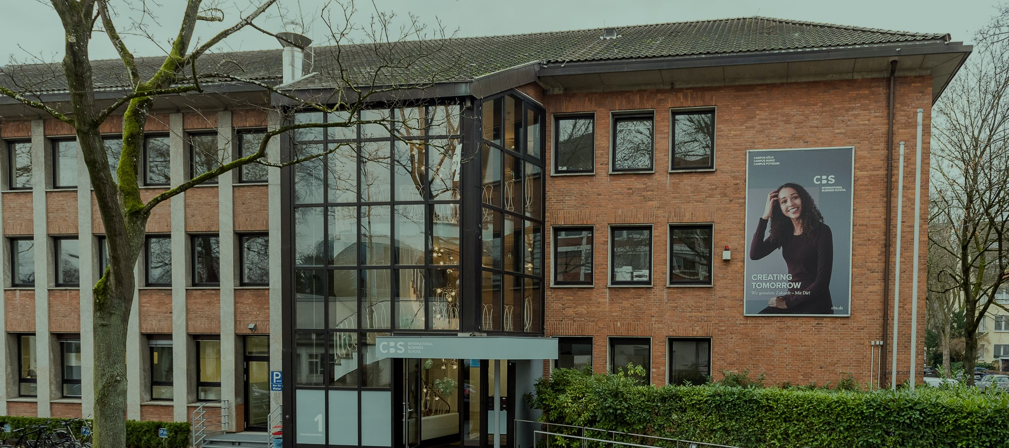 Haupteingang des Campus Köln